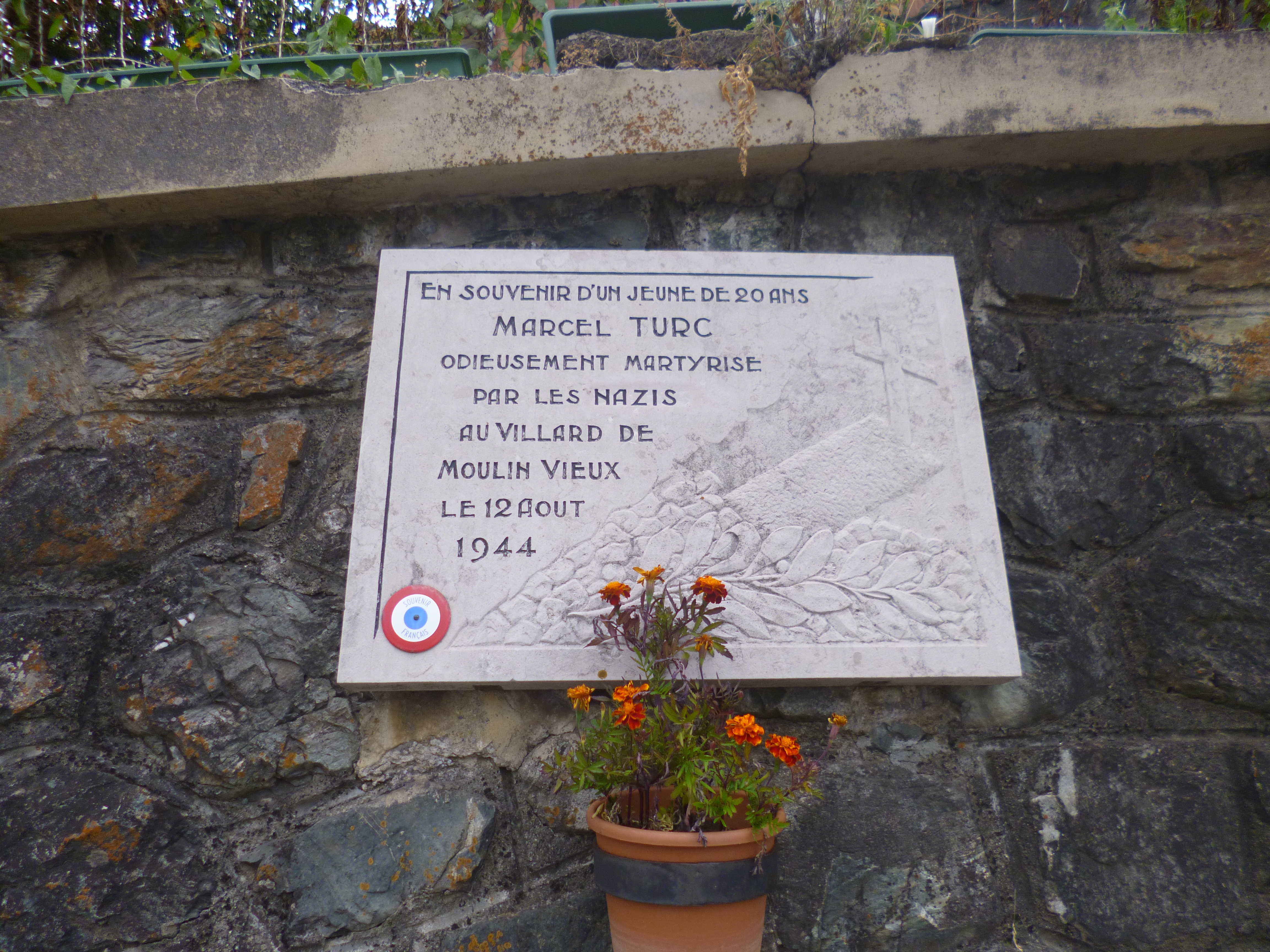 Plaque commémorative à la mémoire du maquisard Marcel Turc, fusillé en août 1944, à Lavaldens (Isère). Septembre 2013